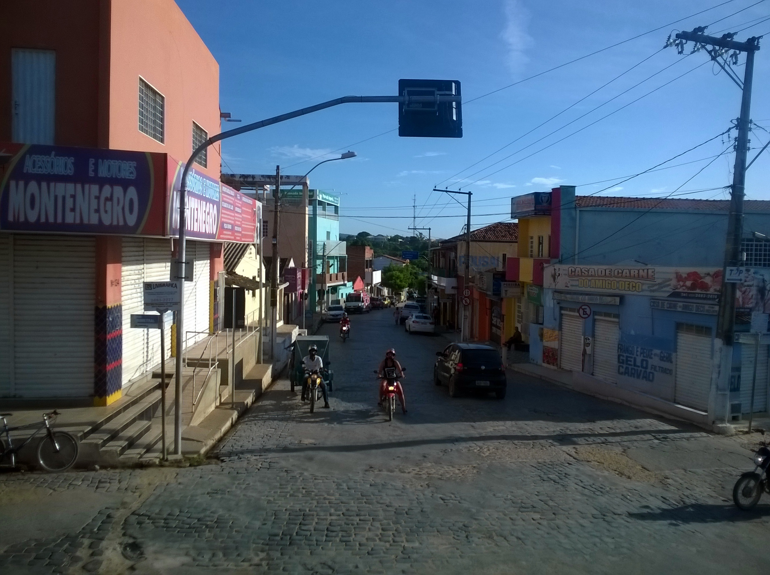 Rua Mariano Borges em Santa Maria da Vitória. Foto de 11 de janeiro de 2017.